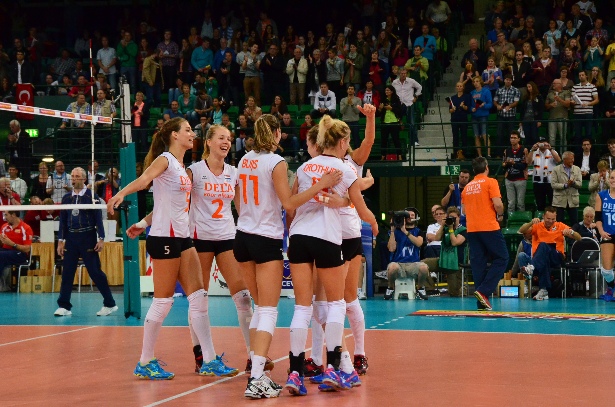 Volleyball-Europameisterschaft der Frauen 2013-Spielort Halle (Westf) Gerry-Weber-Stadion - Spiel 8. September 2013 (Spanien-Niederlande)